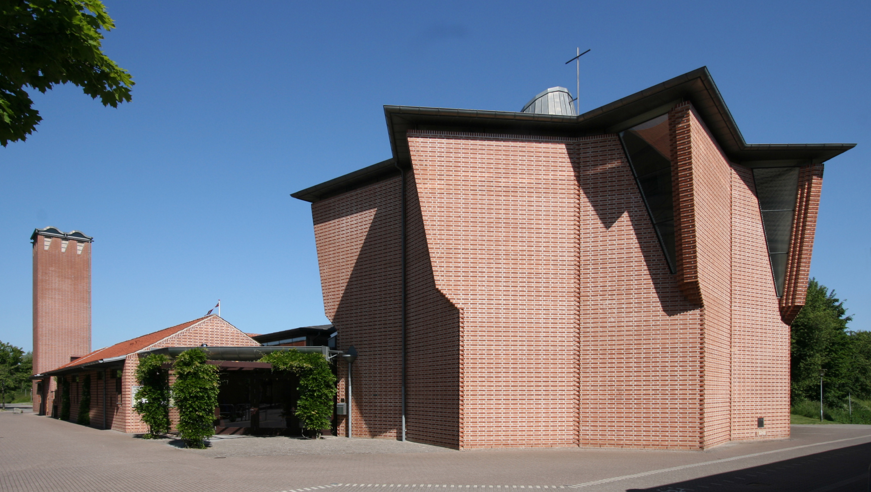 Ølby Kirke, Ølby, Denmark.